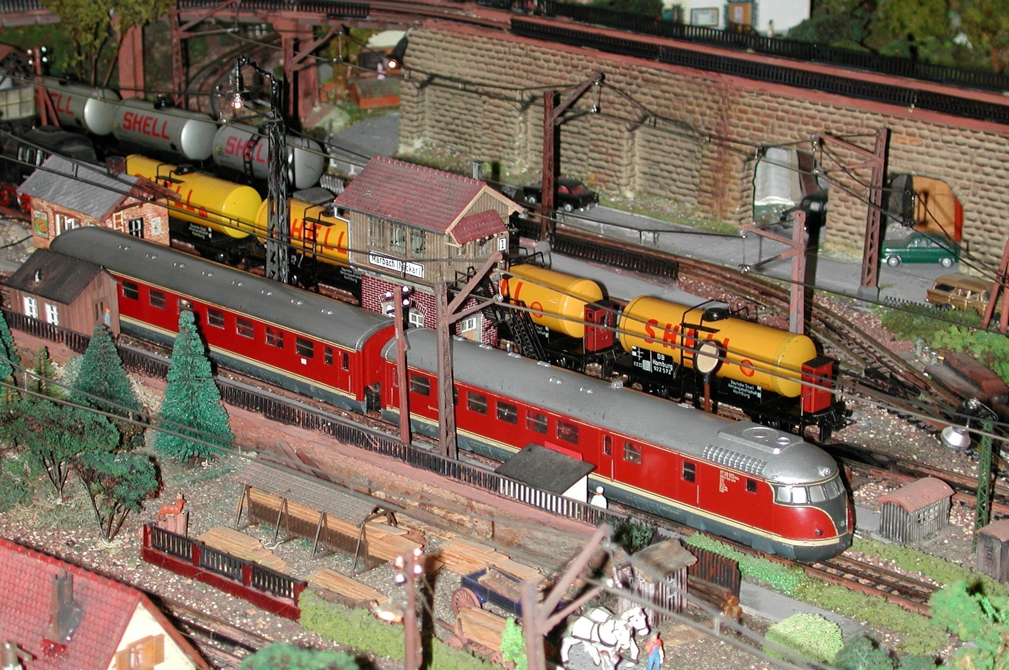 Triebwagen VT 08 der DB in der Trix Express Ausführung